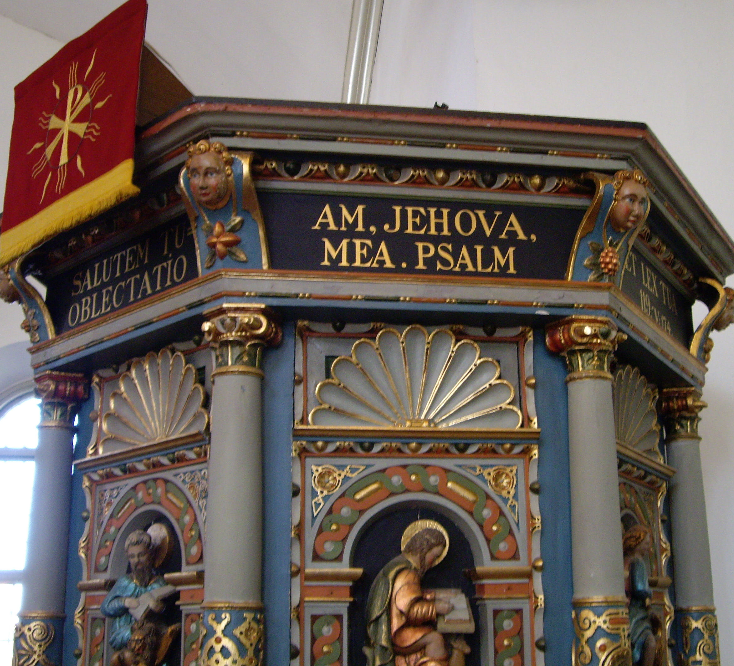 Gudsnamnet Jehova på predikstolen i Ivetofta kyrka